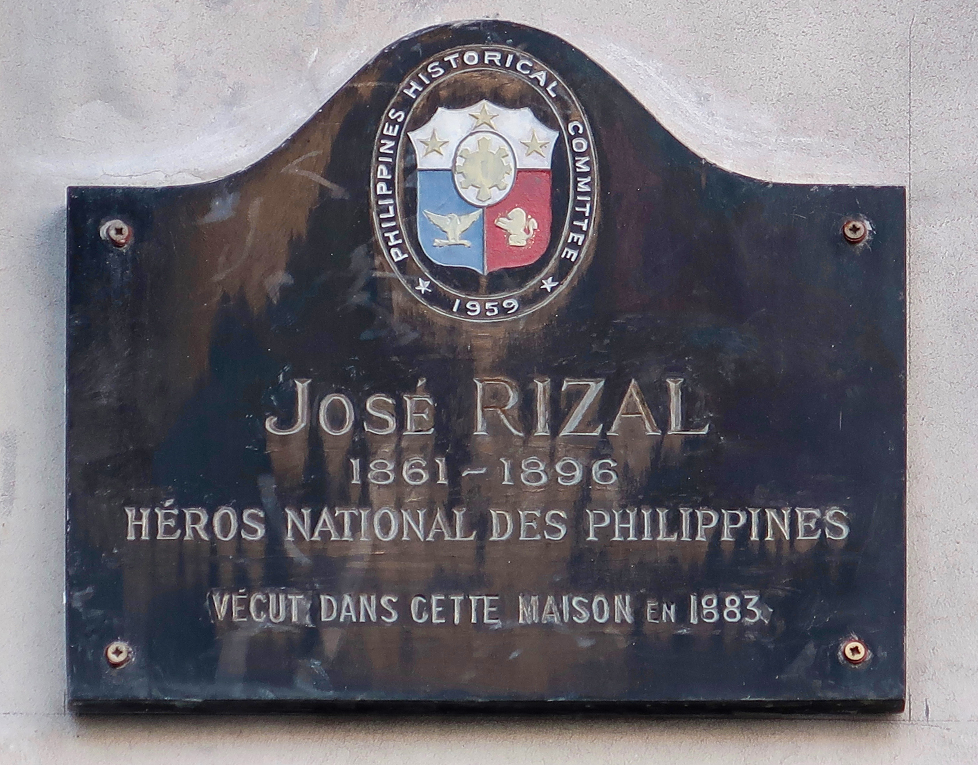 Plaque en hommage à José Rizal, 124 rue de Rennes (Paris 6e).